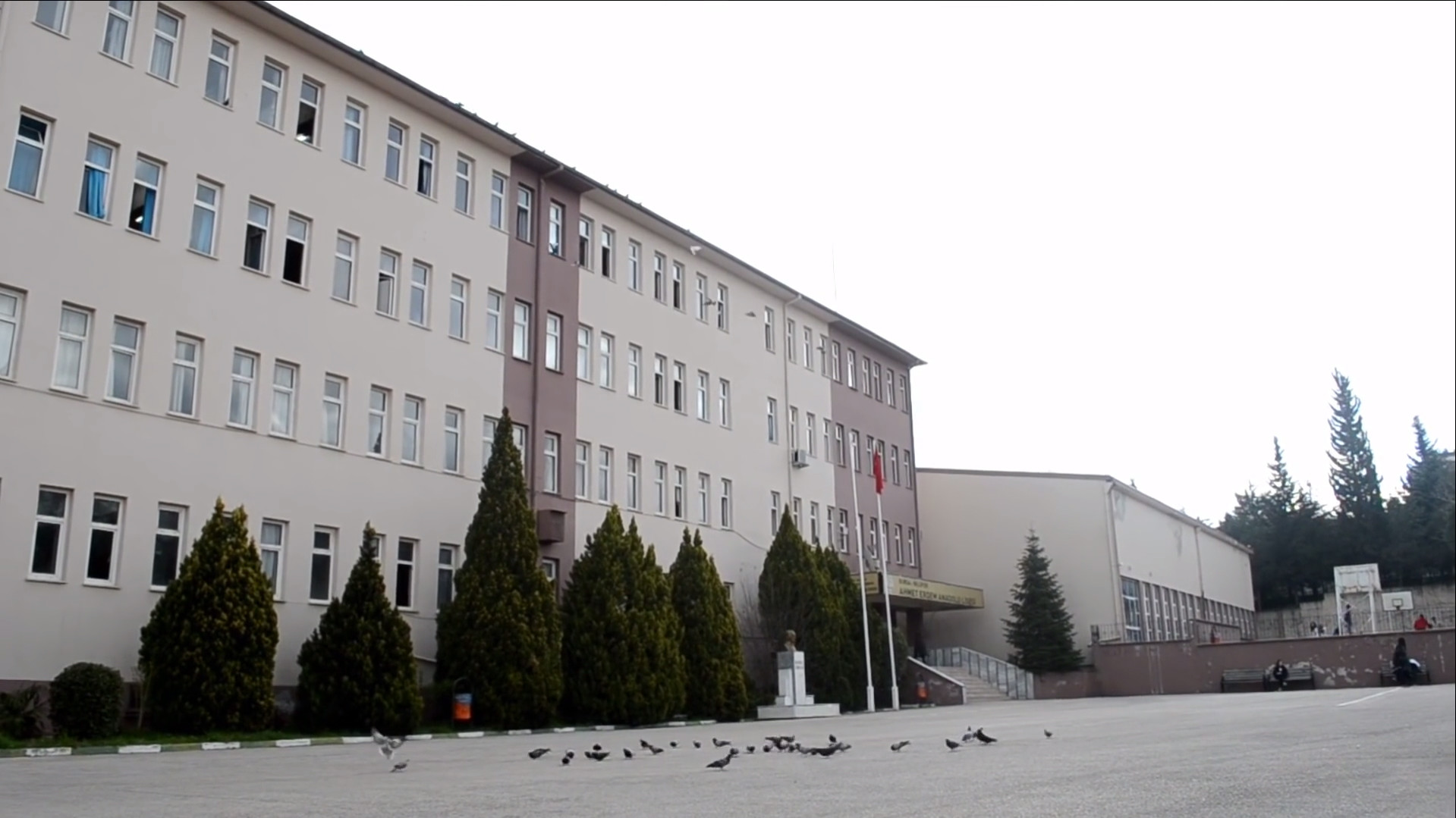 Ahmet Erdem Anadolu Lisesi Binası